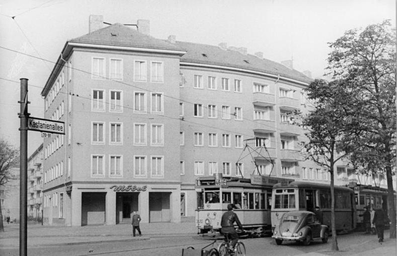 Berlin, Kastanienallee, Wohnblock, Straßenbahn ADN-ZB Zählsdorf Frö-Schm 3.11.1958 4 Jahre Wohnungsbau im Stadtbezirk Berlin-Mitte: Rund 860 Wohnungen entstanden allein im Stadtbezirk Berlin-Mitte in der Zeit von 1954 bis 1958. 638 Wohnungseinheiten sind zur Zeit im Bau. Durch die Arbeiterwohnungsbaugenossenschaften werden gegenwärtig 562 WE errichtet. UBz: Ein großer Wohnblock ist an der Schwedterstrasse, Ecke Kastanienallee, entstanden.